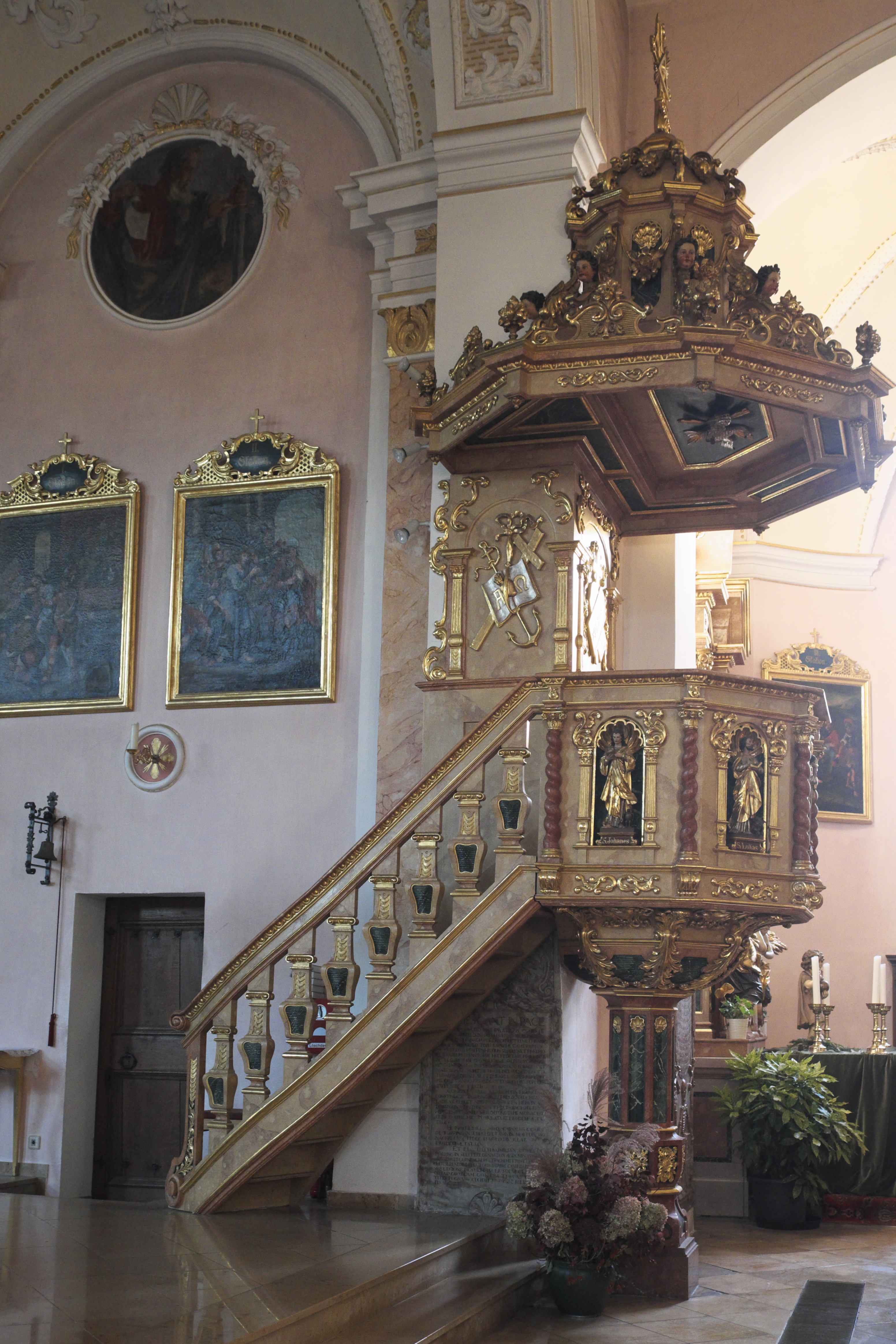 Katholische Pfarrkirche St. Vitus in Au in der Hallertau im Landkreis Freising (Bayern/Deutschland), Kanzel